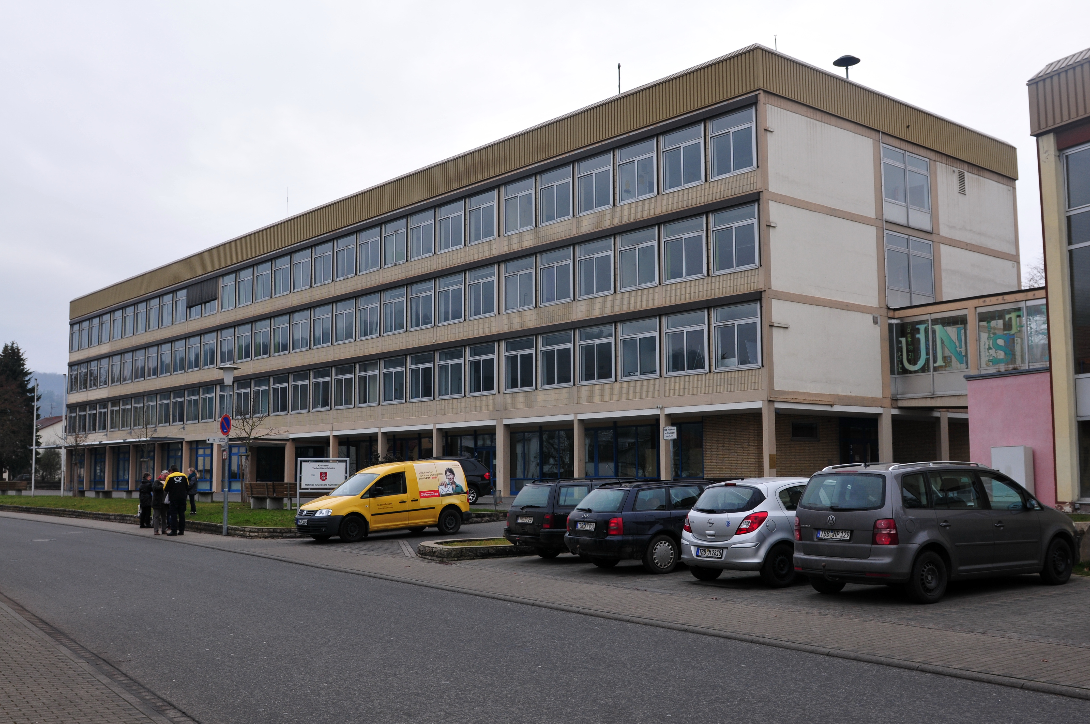 Tauberbischofsheim